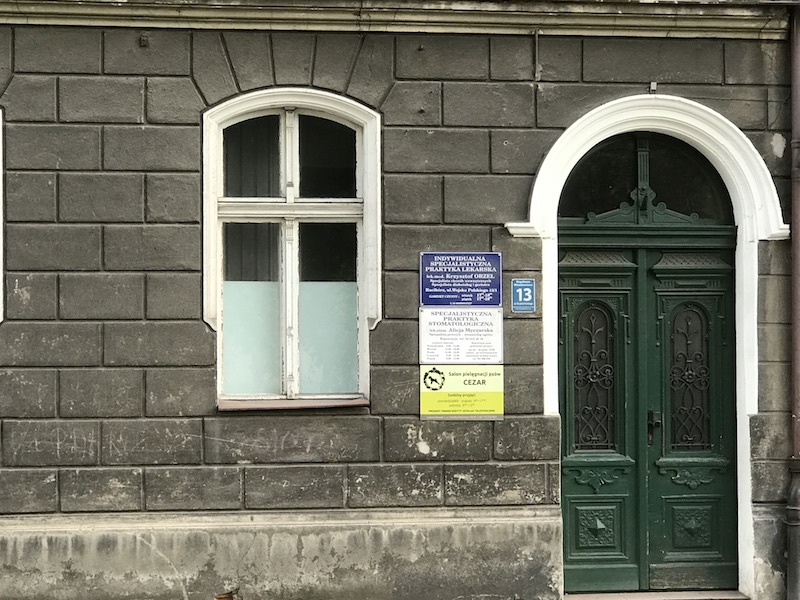 Kamienica przy ul. Wojska Polskiego 13 w Raciborzu